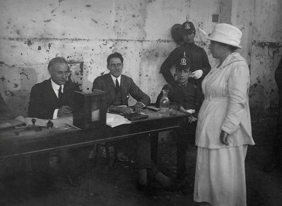 "Julieta Lanteri - primera mujer que logró votar en Argentina y América Latina, quinta mujer en recibirse de médica, fundadora y candidata por el Partido Feminista Nacional -, llegando a los comicios para depositar su voto, 1911."